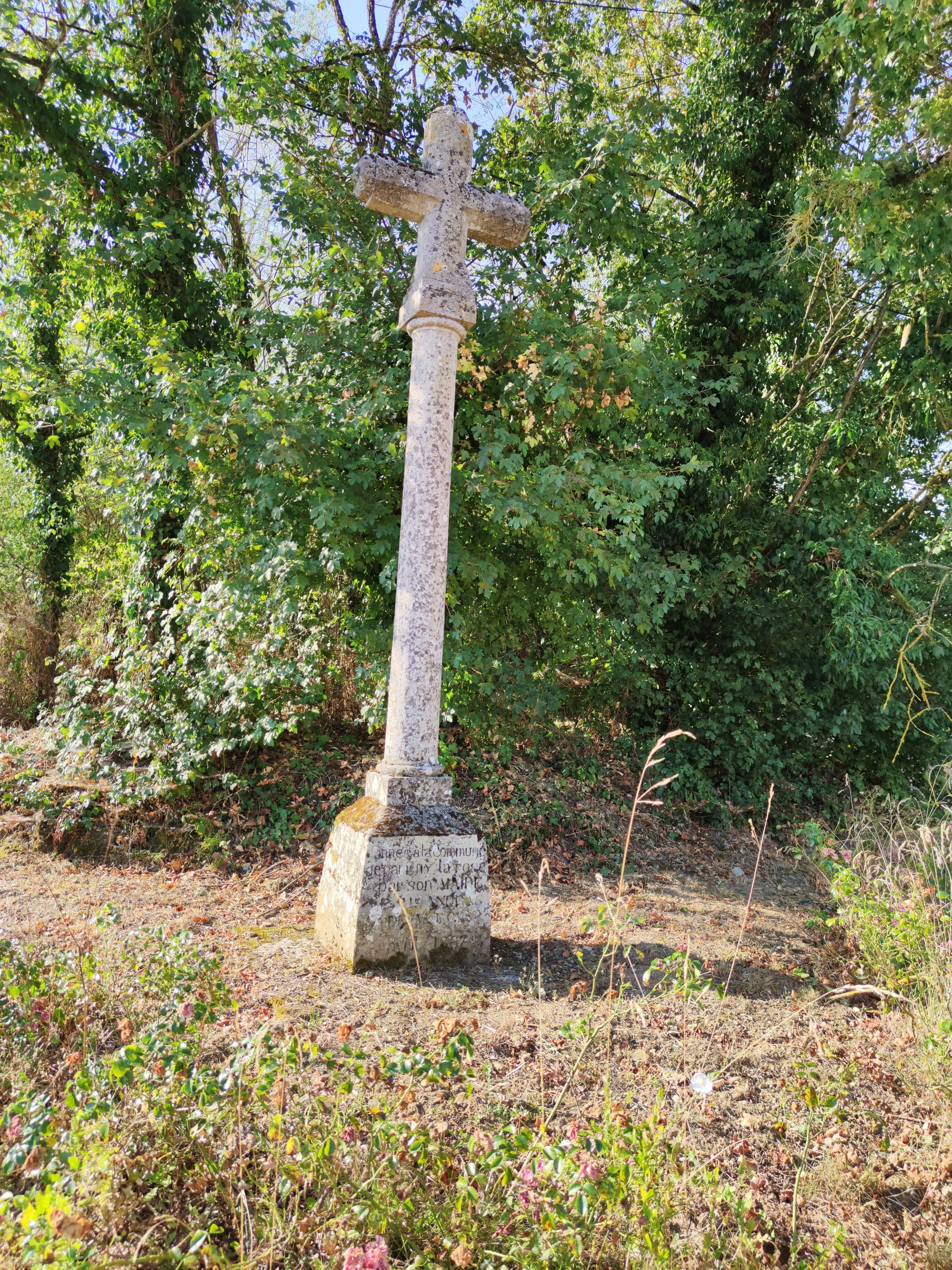 Croix de Parigny-la-Rose (Nièvre).